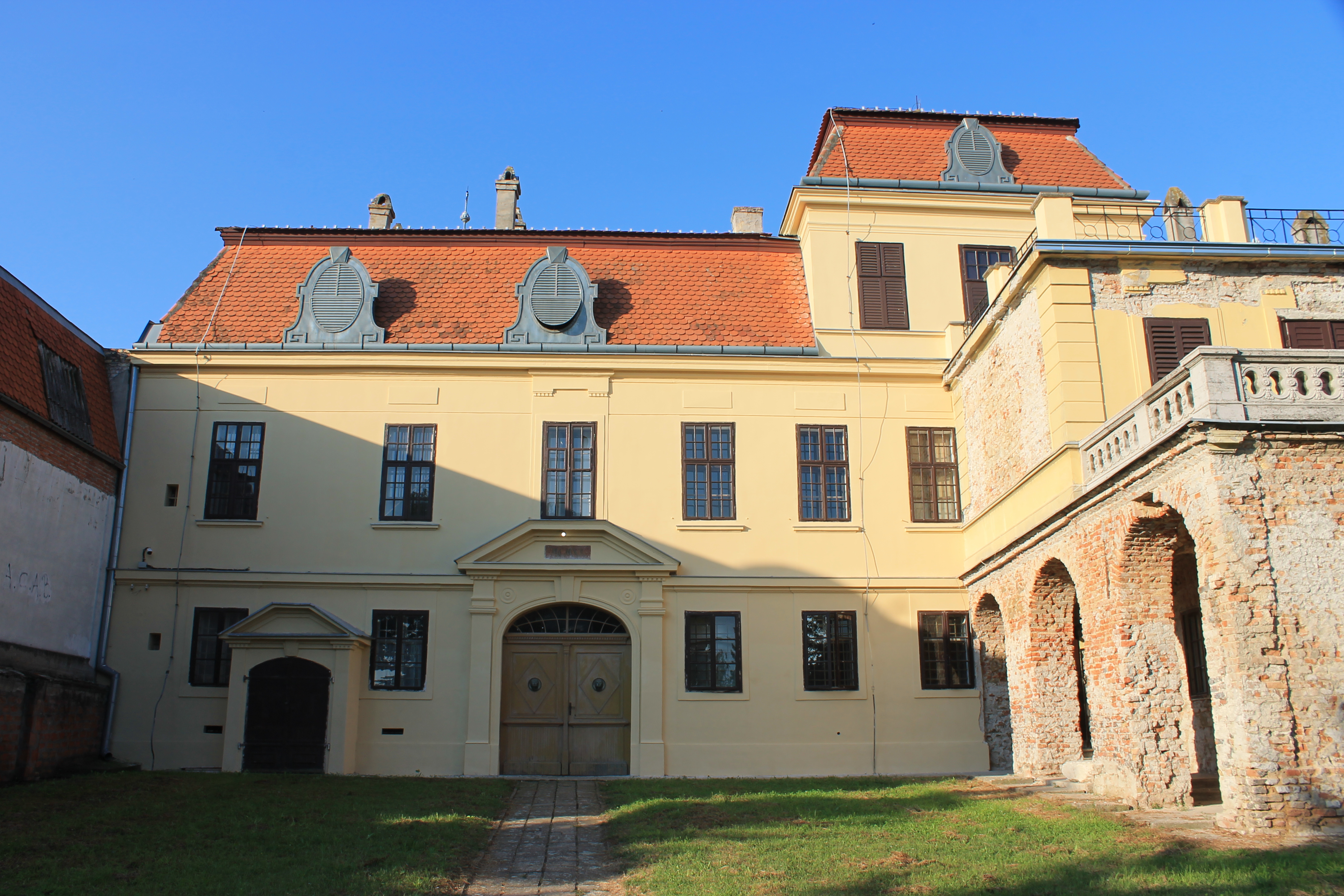 Palata Ilion